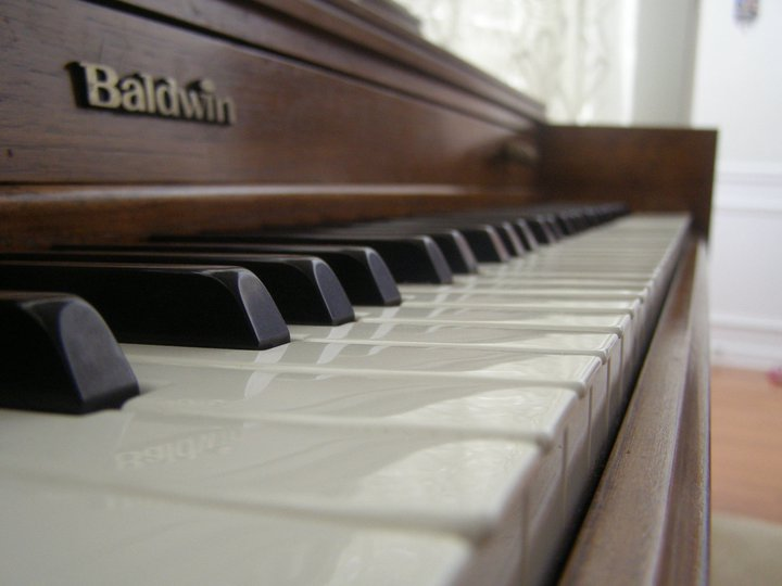 Baldwin piano close-up